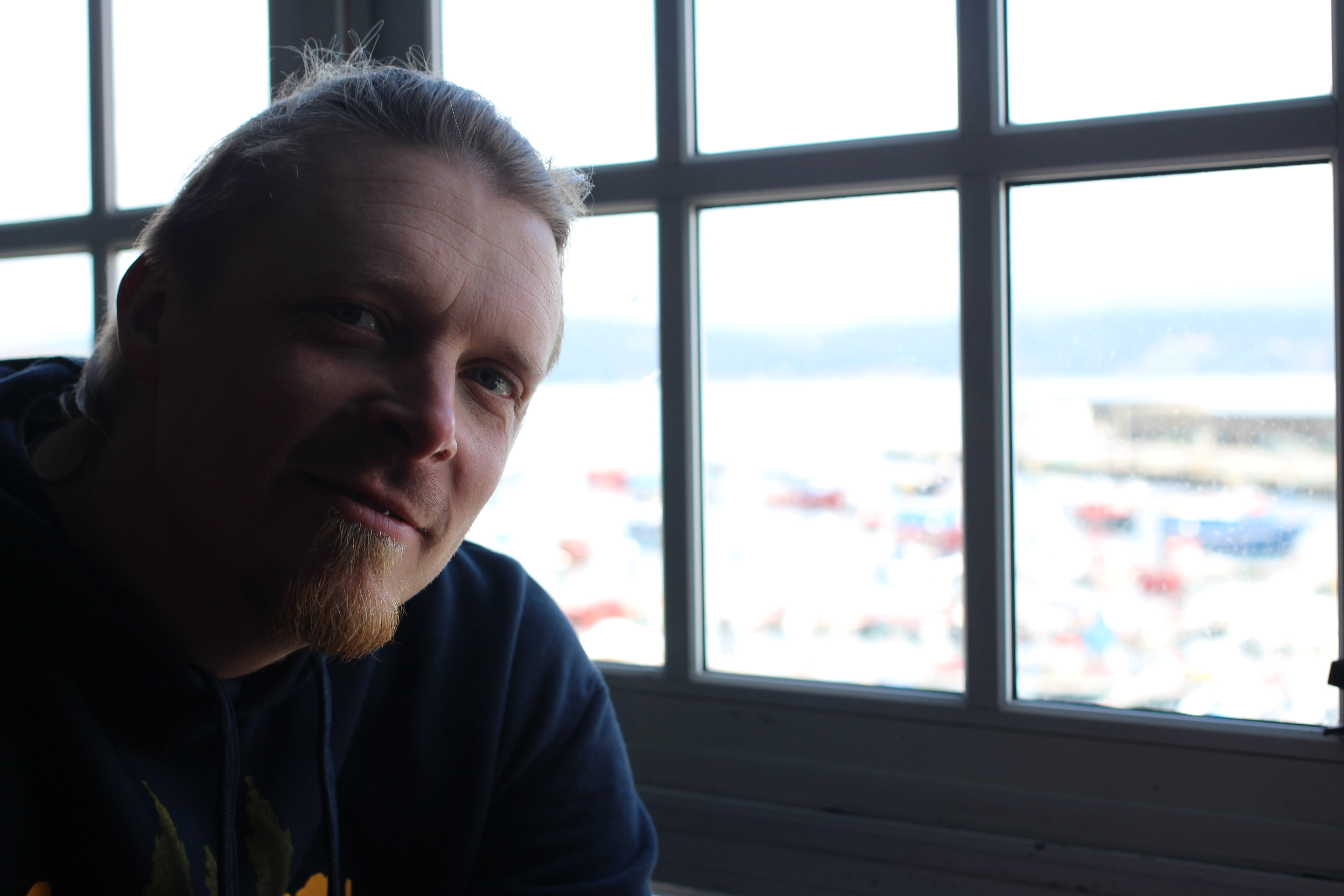 Foto von Lars Engelbrecht